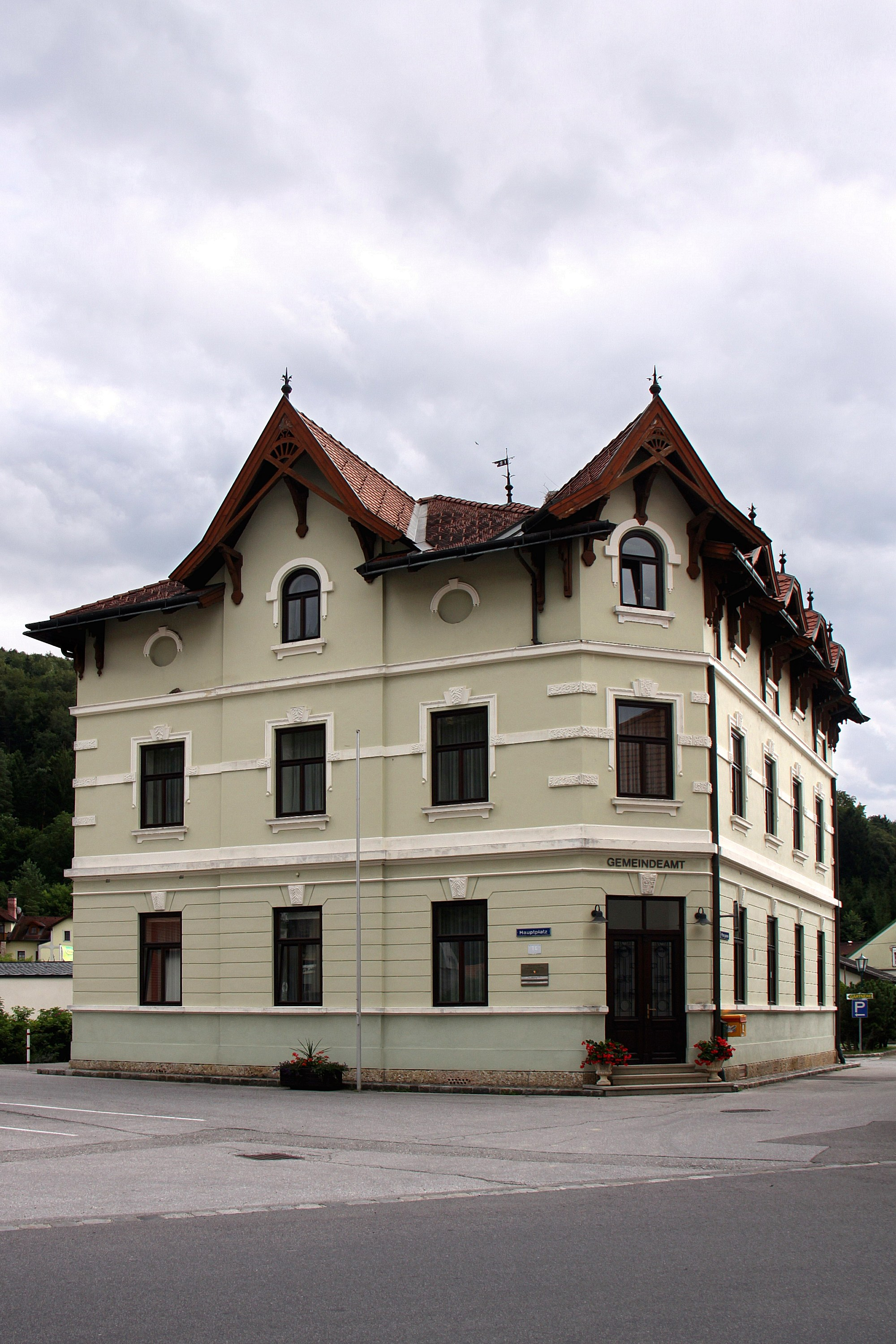 Denkmalgeschütztes Gemeindeamt in Scheiblingkirchen-Thernberg. Object location47° 39′ 30.42″ N, 16° 08′ 06.83″ E